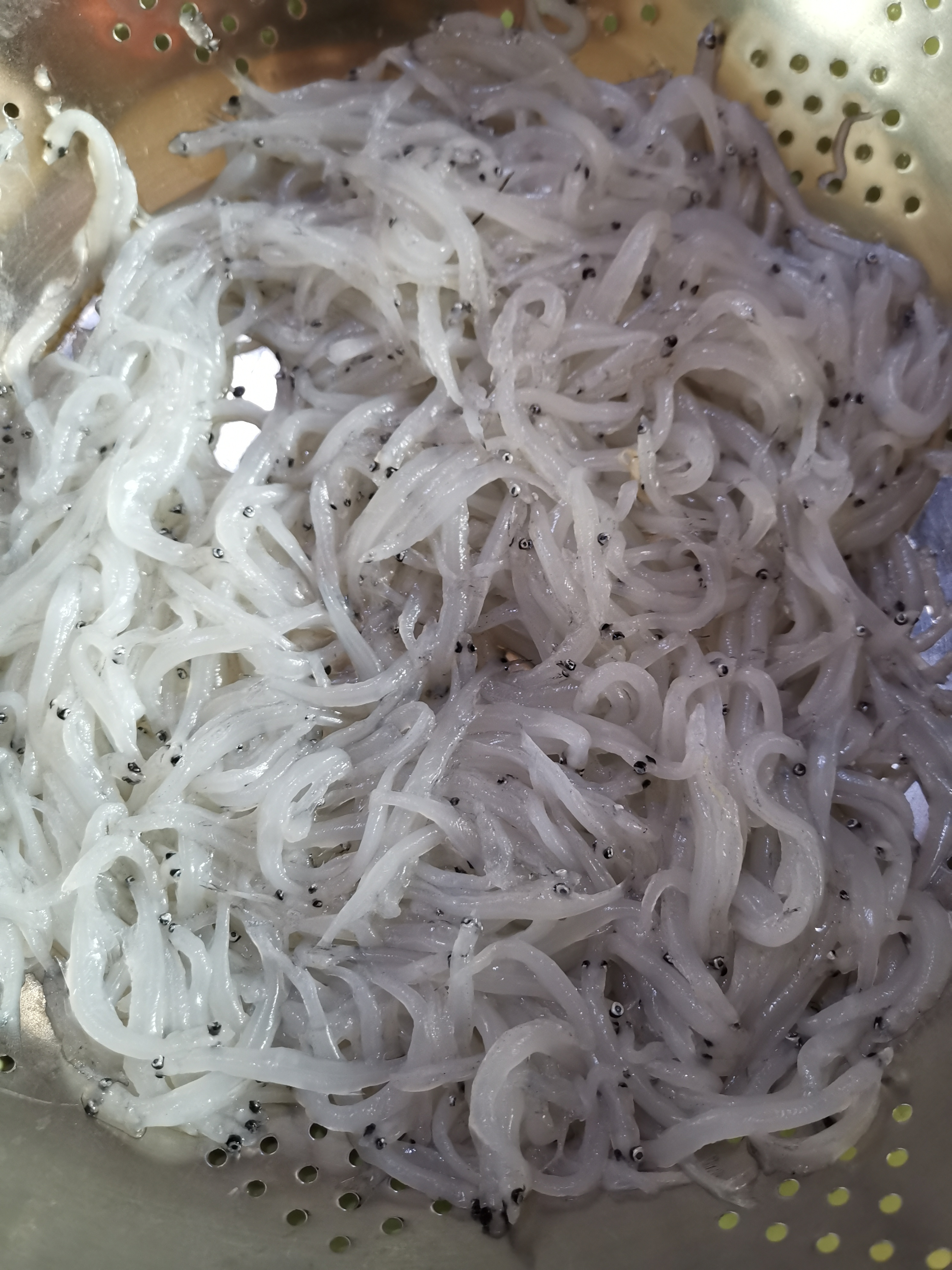 无锡太湖银鱼